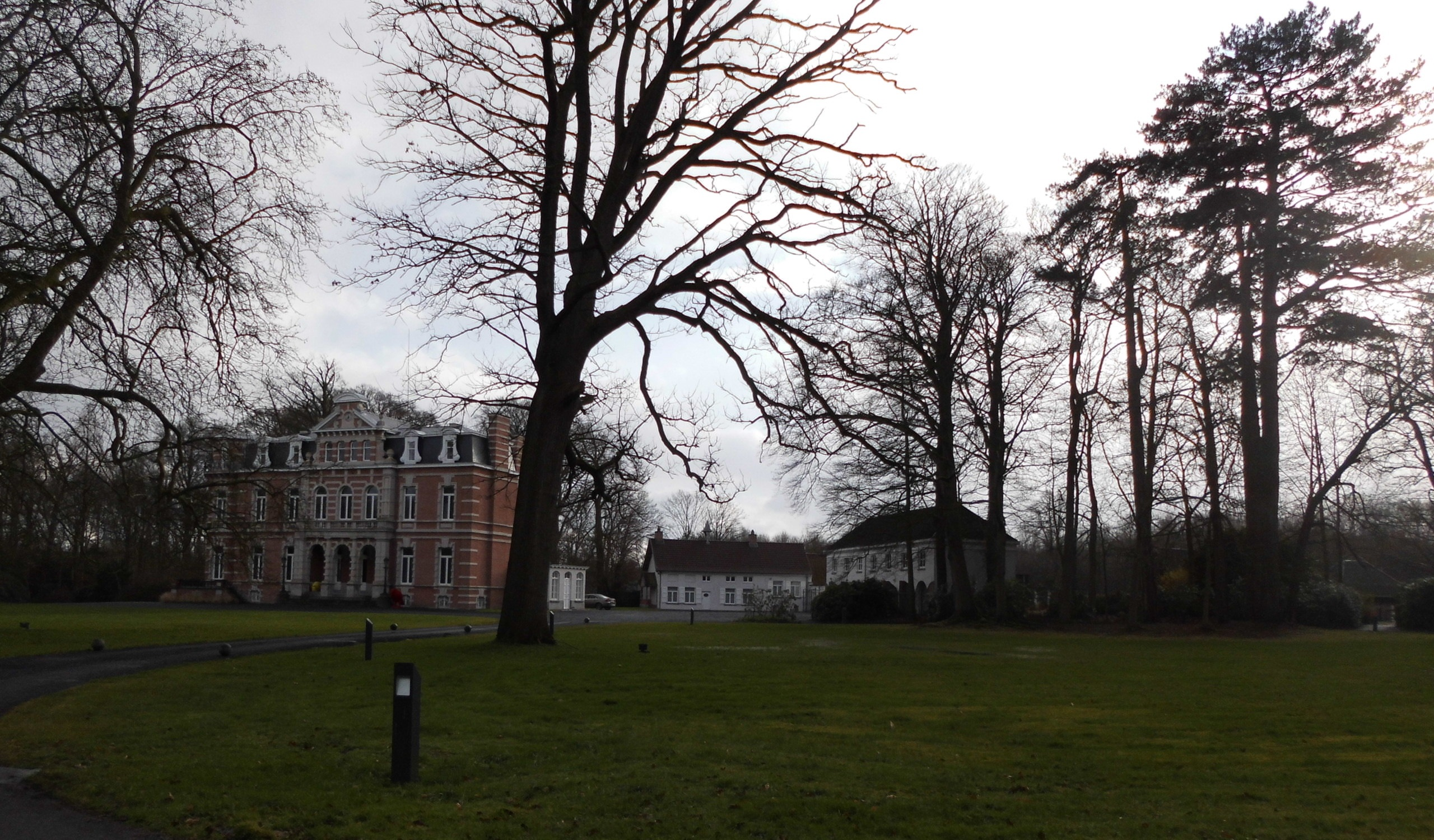 Kasteel De Cellen - Kapellestraat - Oostkamp - West-Vlaanderen - België